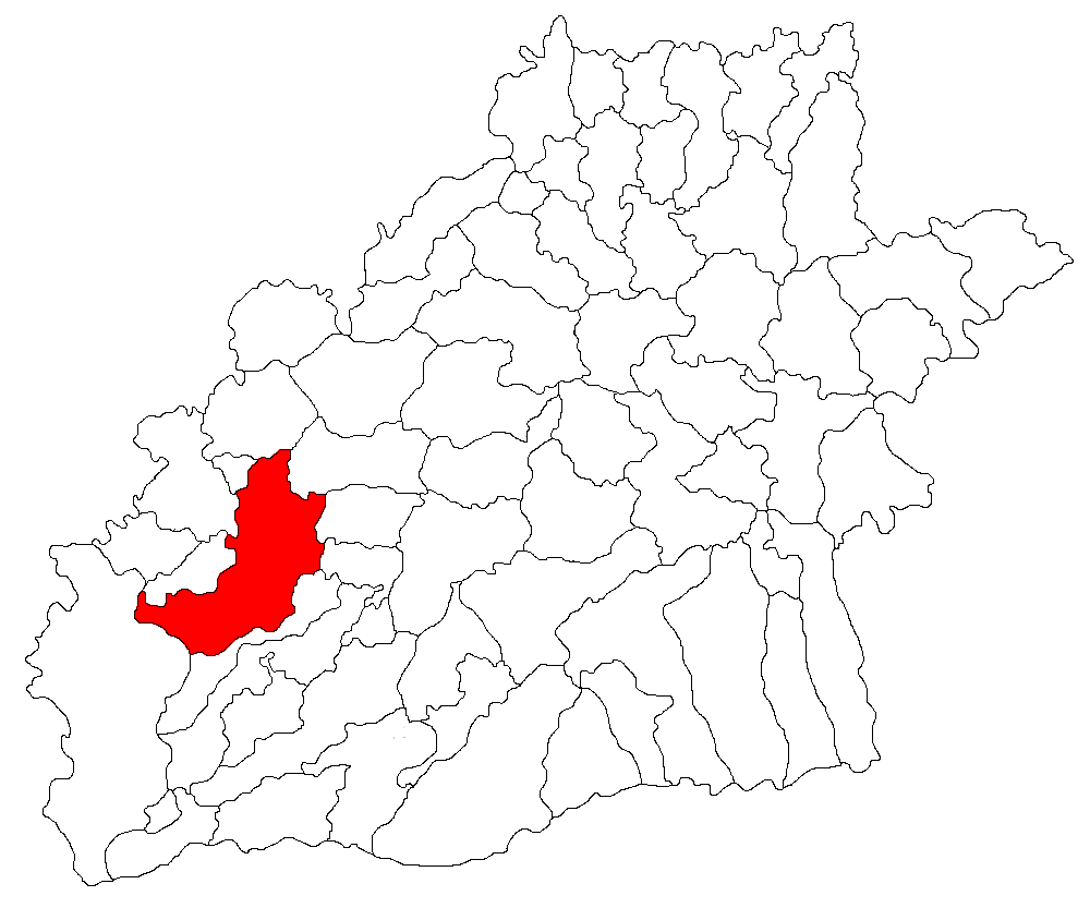 Categorie:Hărţi ale judeţului Sibiu